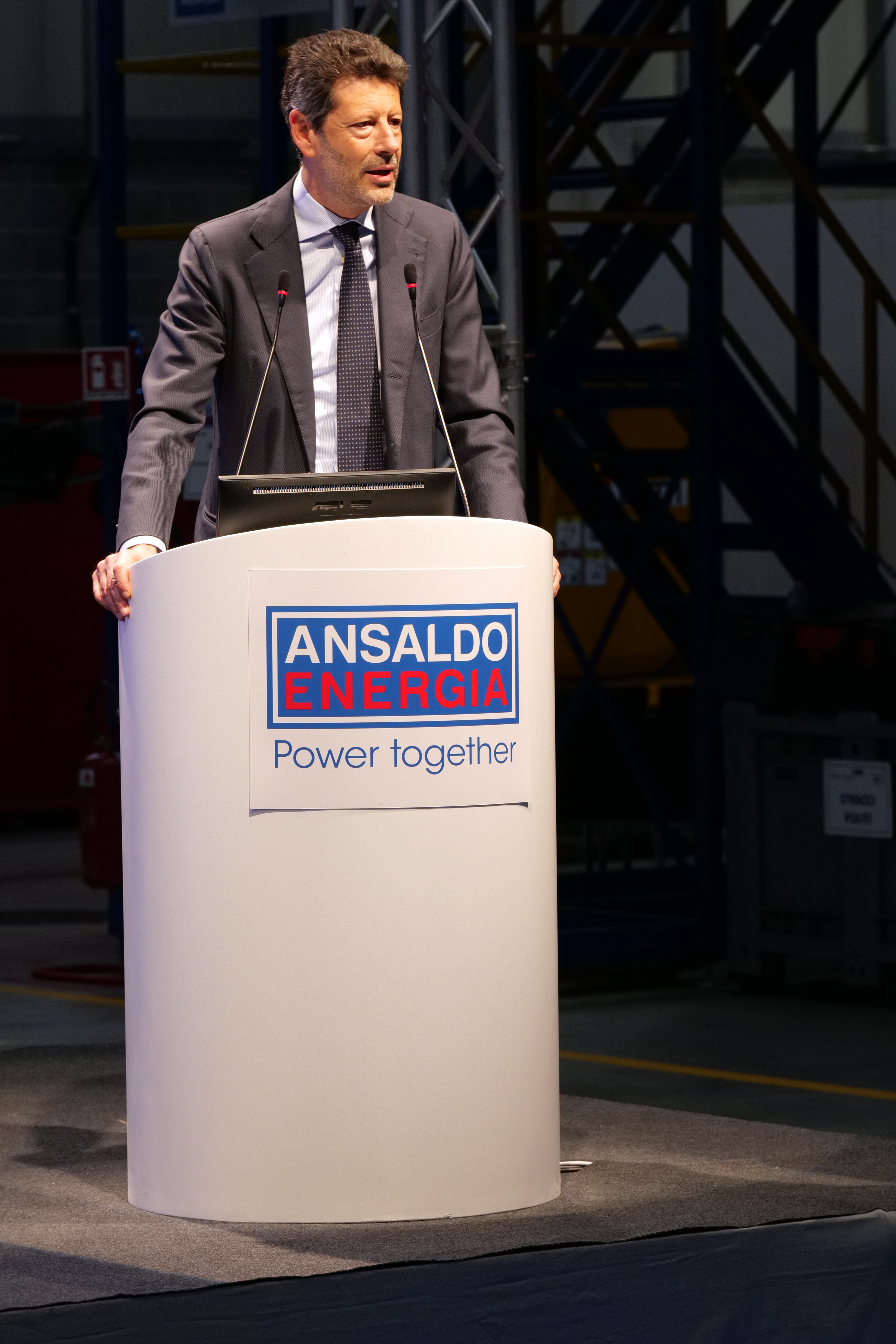 Giuseppe Marino